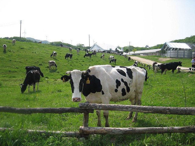 대관령5